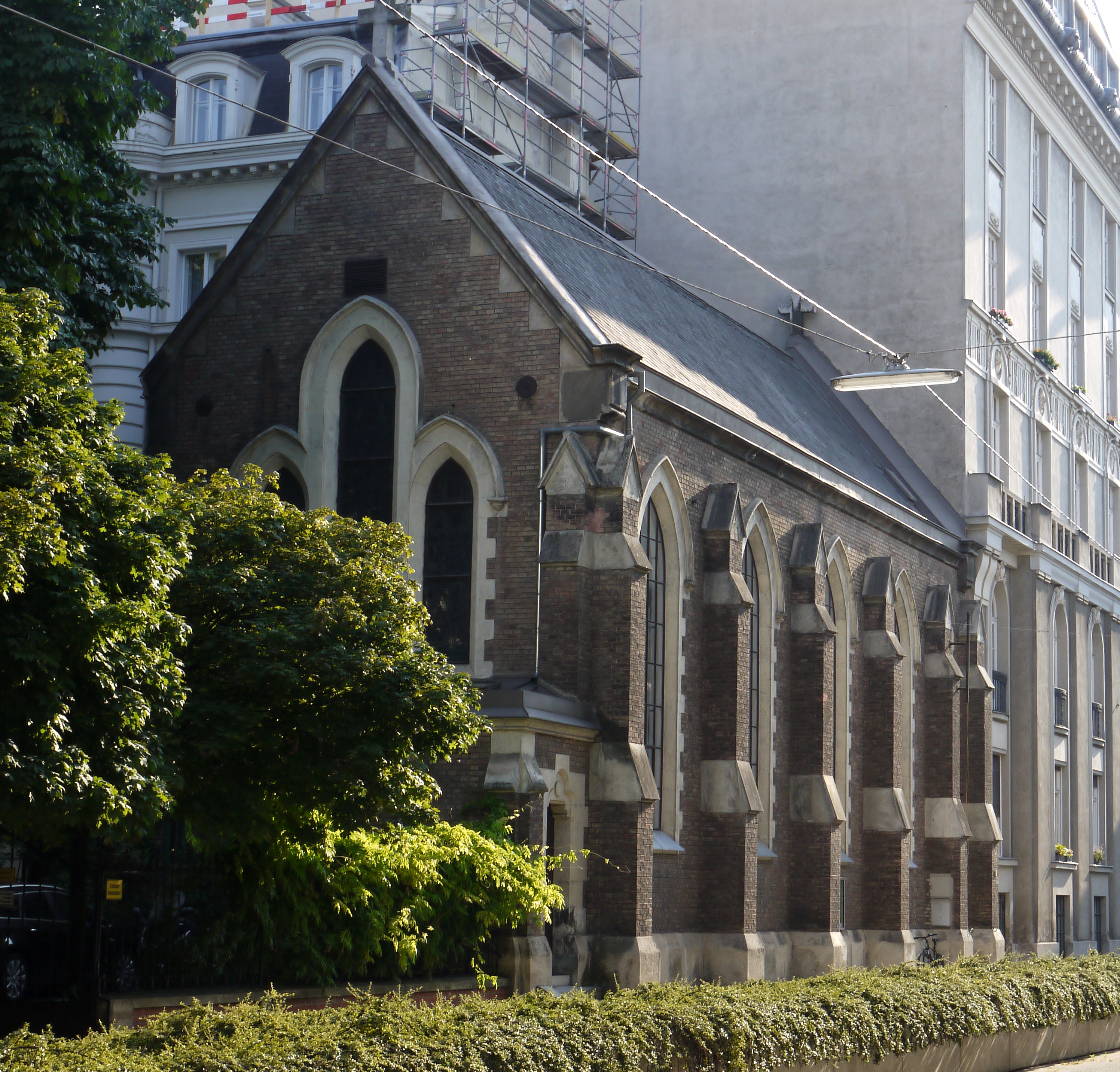 Anglikanische Kirche, Christ Church